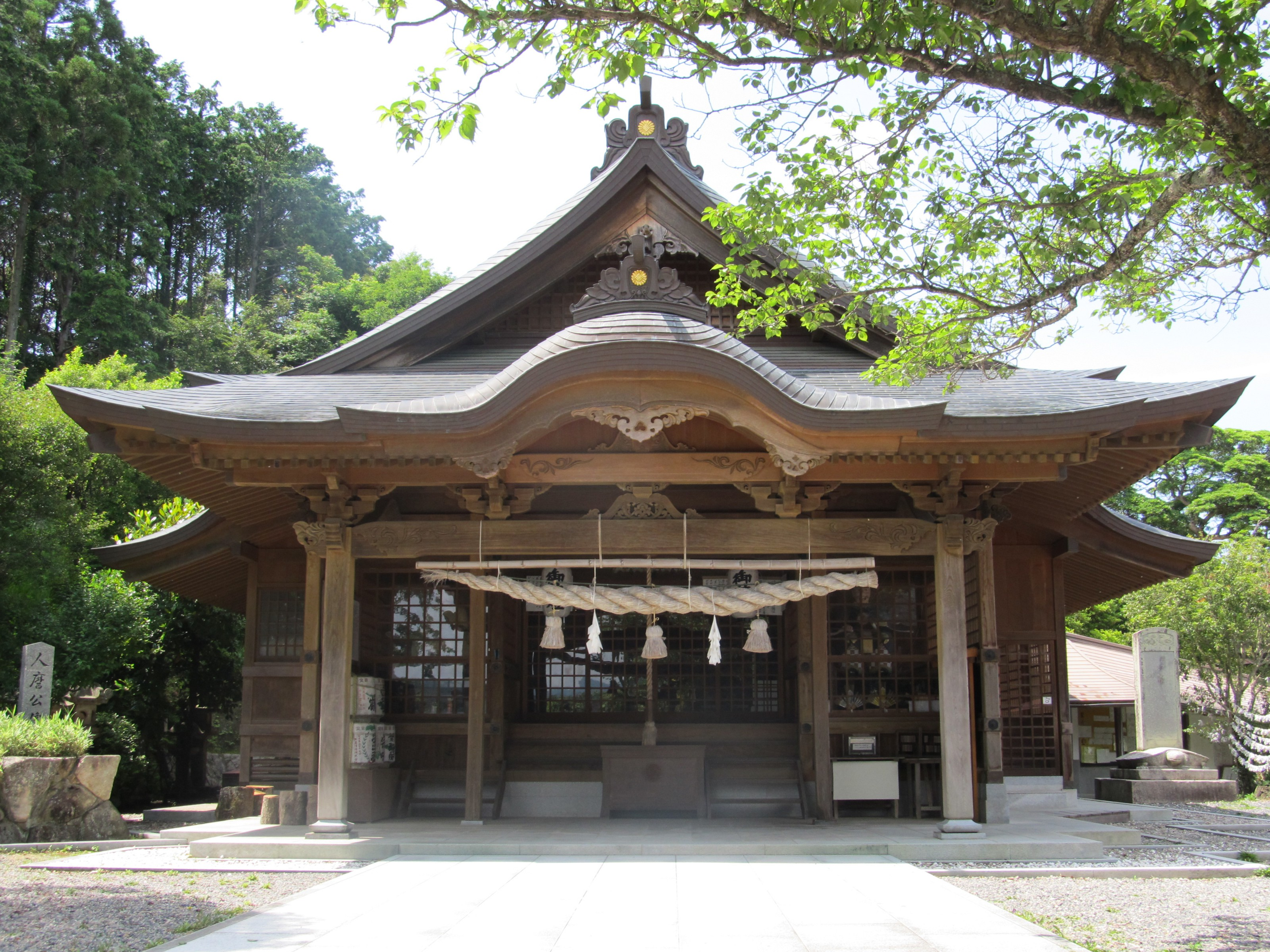 高津柿本神社 拝殿